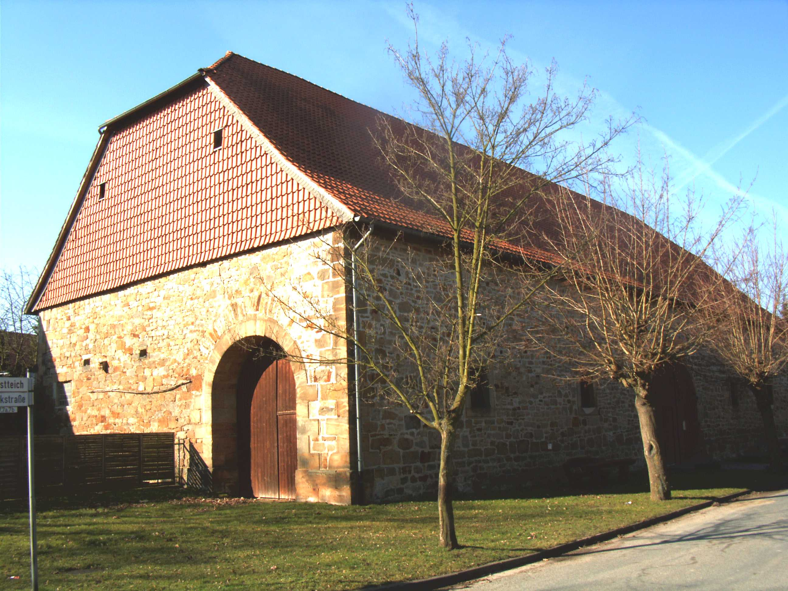 Schäferscheune Sillium, Gemeinde Holle, 20.03.2005 (für die GNU-FDL) oder